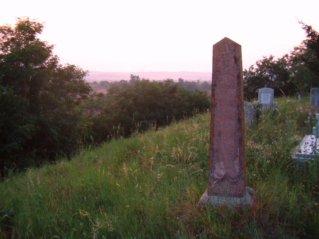 Olthévíz környéke. Látkép a temetőből, közvetlenül naplemente után. 2006. Augusztus 29.